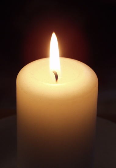 Kerze_2007